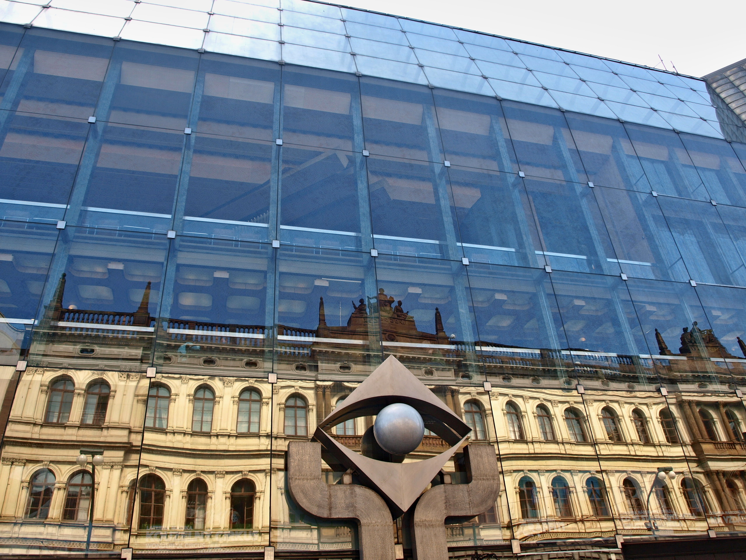 Nová scéna ND v Praze - Laterna Magica